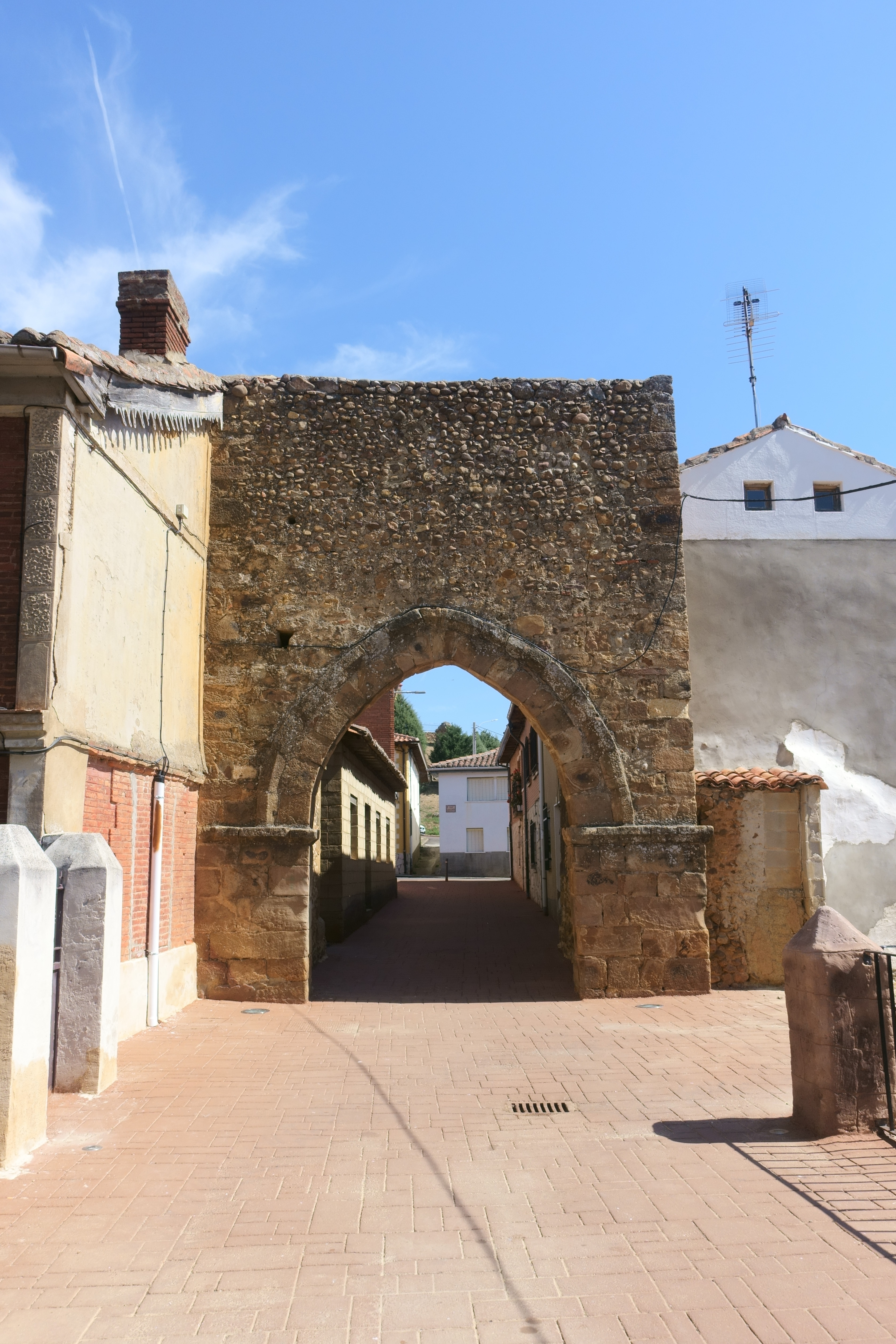 Arco de la muralla de Almanza (León, España).